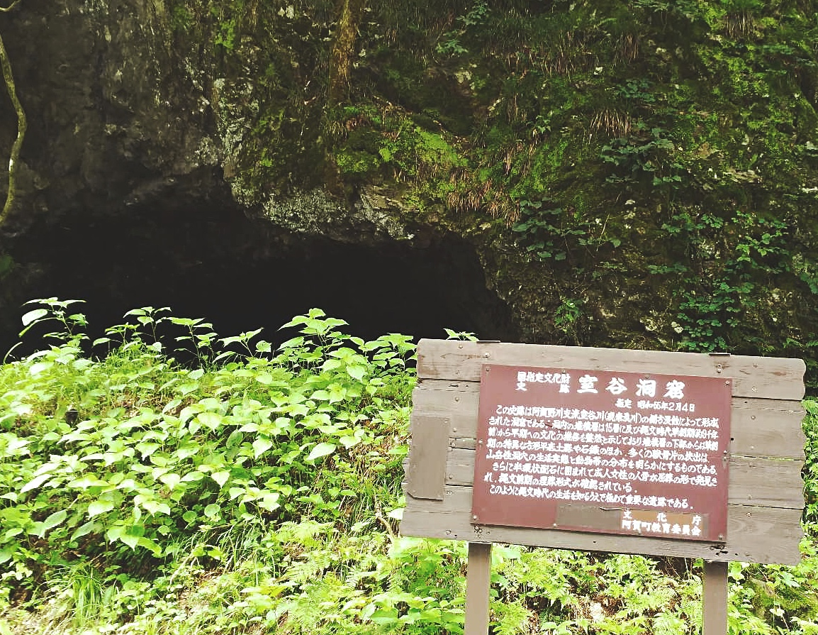 Entrance to Muroya Cave, Aga, Niigata, Japan